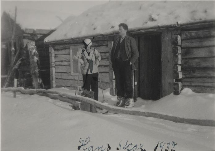 Lærer Hans Skar utenfor hans hytte i Snåsafjellene sammen med uidentifisert kvinne, 1937